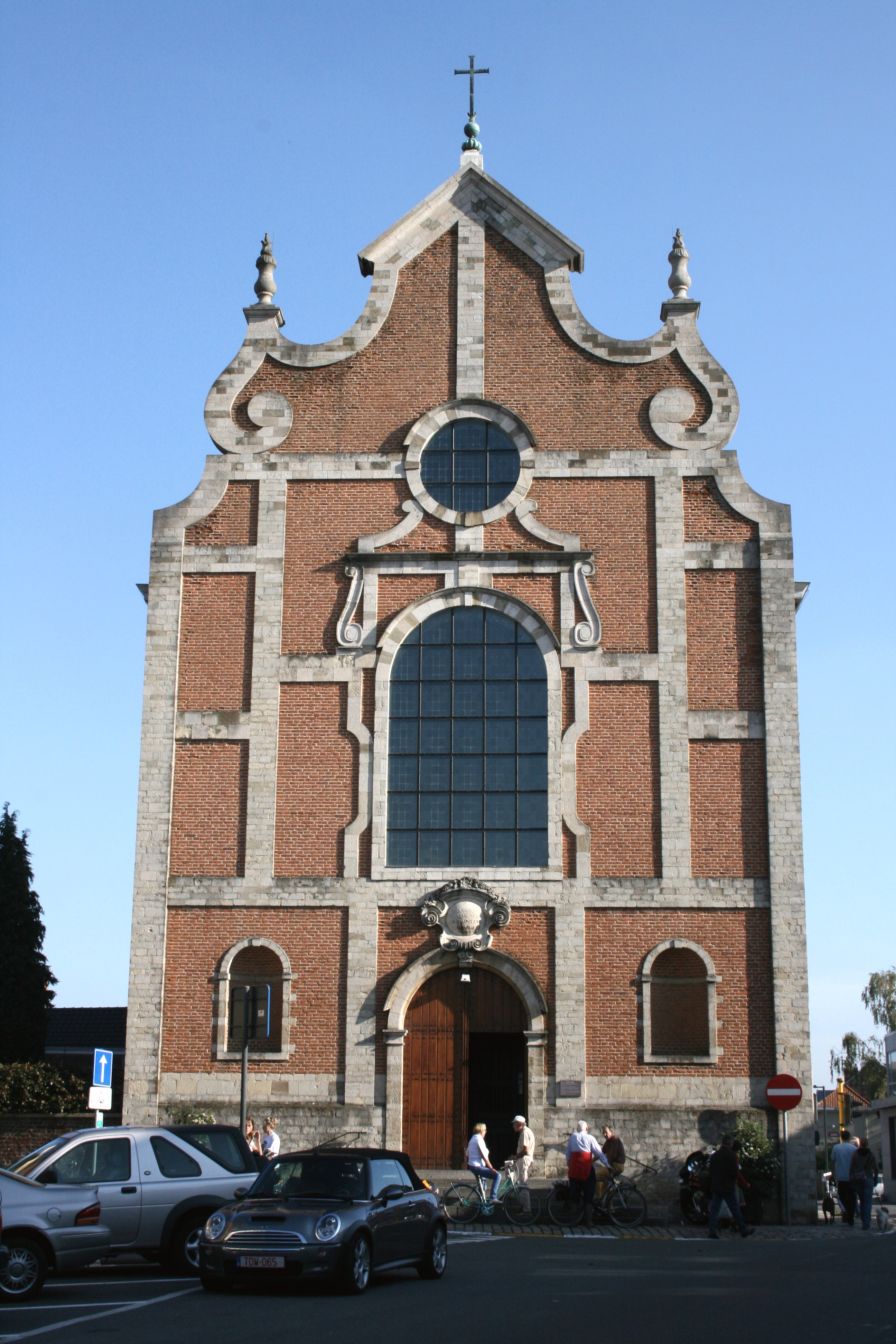 Onze-Lieve-Vrouwkerk te Jezus-Eik, Overijse (Vlaams-Brabant), België. Barokke stijl Eglise Notre-Dame au Bois, Jezus-Eik, Overijse (Brabant flamand), Belgique. Style baroque